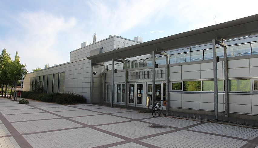 Myyrmäen urheilutalo Myyrmäenraitilla. Talo pitää sisällään mm. Myyrmäen uimahallin. Myyrmäki, Vantaa. Huom: Muista säilyttää viittaus kuvaajaan, mikäli käytät kuvaa.